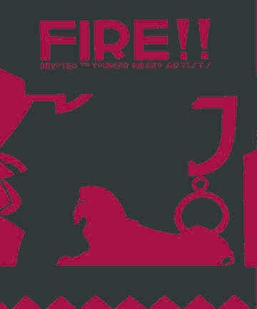 Cover des Fire!! Magazins